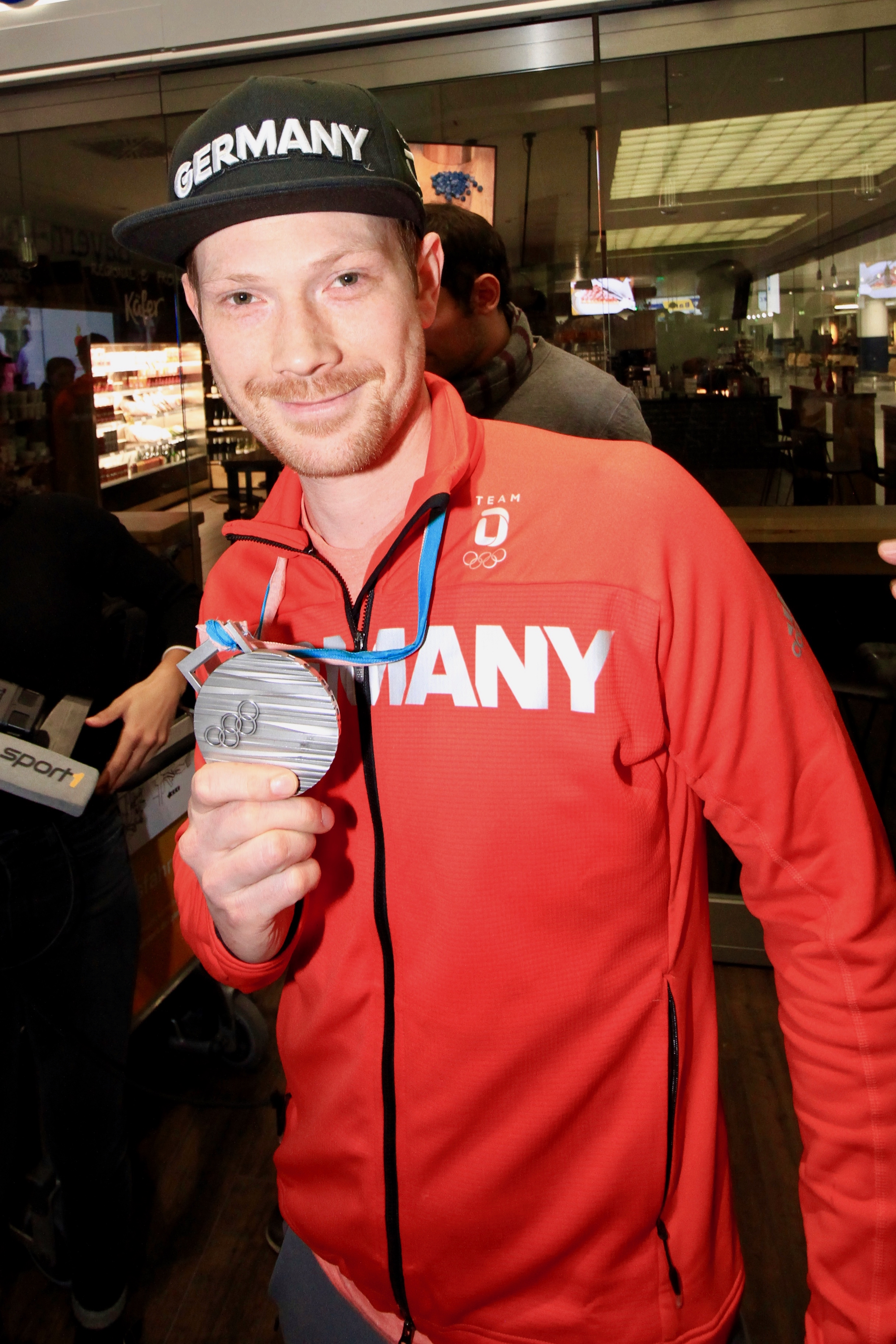 Danny aus den Birken bei Ankunft mit Silbermedaille.